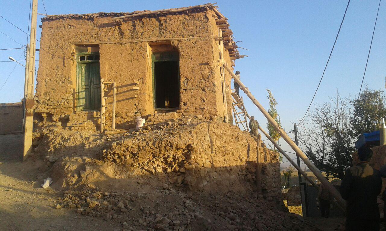 ورودی اصلی مسجد قدیم روستای جهان